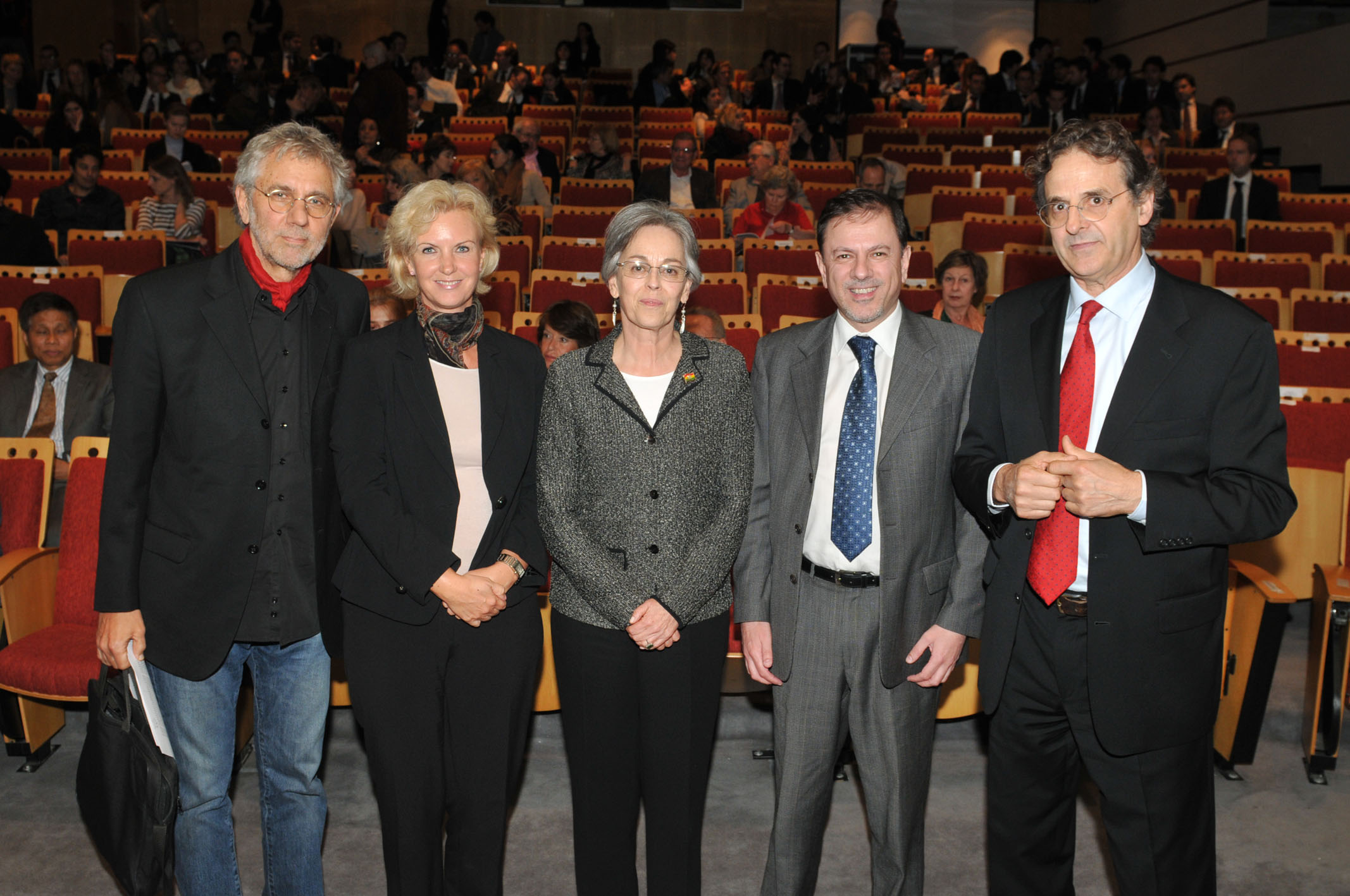 El Vicecanciller Eduardo Zuaín presentó en la Cancillería argentina el film El Clavel Negro. La película narra la actuación del embajador sueco Harald Edelstam, quien salvó numerosas vidas durante la dictadura chilena que derrocó a Salvador Allende en Chile en 1973. Estuvieron presentes (de izq. a der. de la foto) el director del film, Ulf Hultberg, la embajadora del Reino de Suecia, Britt Charlotte Wrangberg, la embajadora del Estado Plurinacional de Bolivia, María Leonor Arauco Lemaitre, el vicecanciller argentino Eduardo Zuaín, y el productor de la película, Carlos Claret.